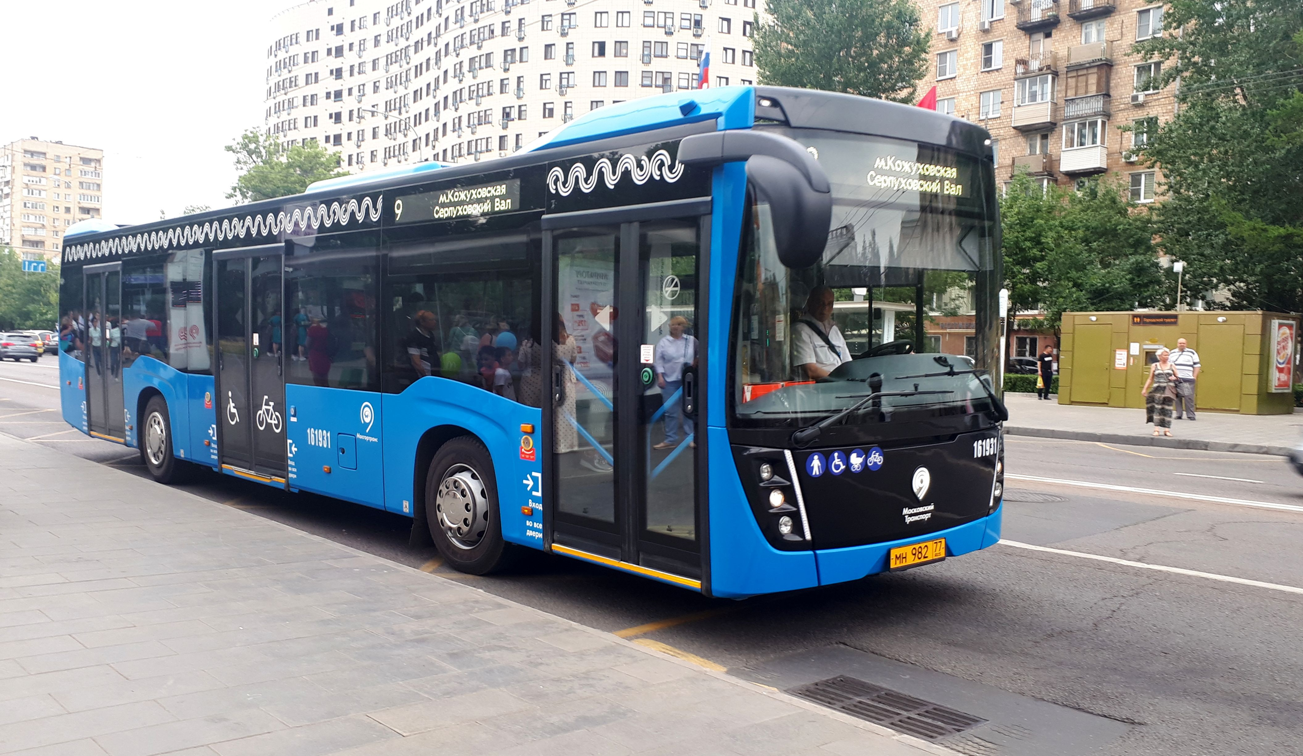 НефАЗ 5299 с изменёнными оперением и оптикой.